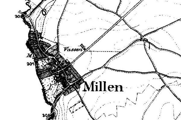 Neuaufnahme 1891 -1912